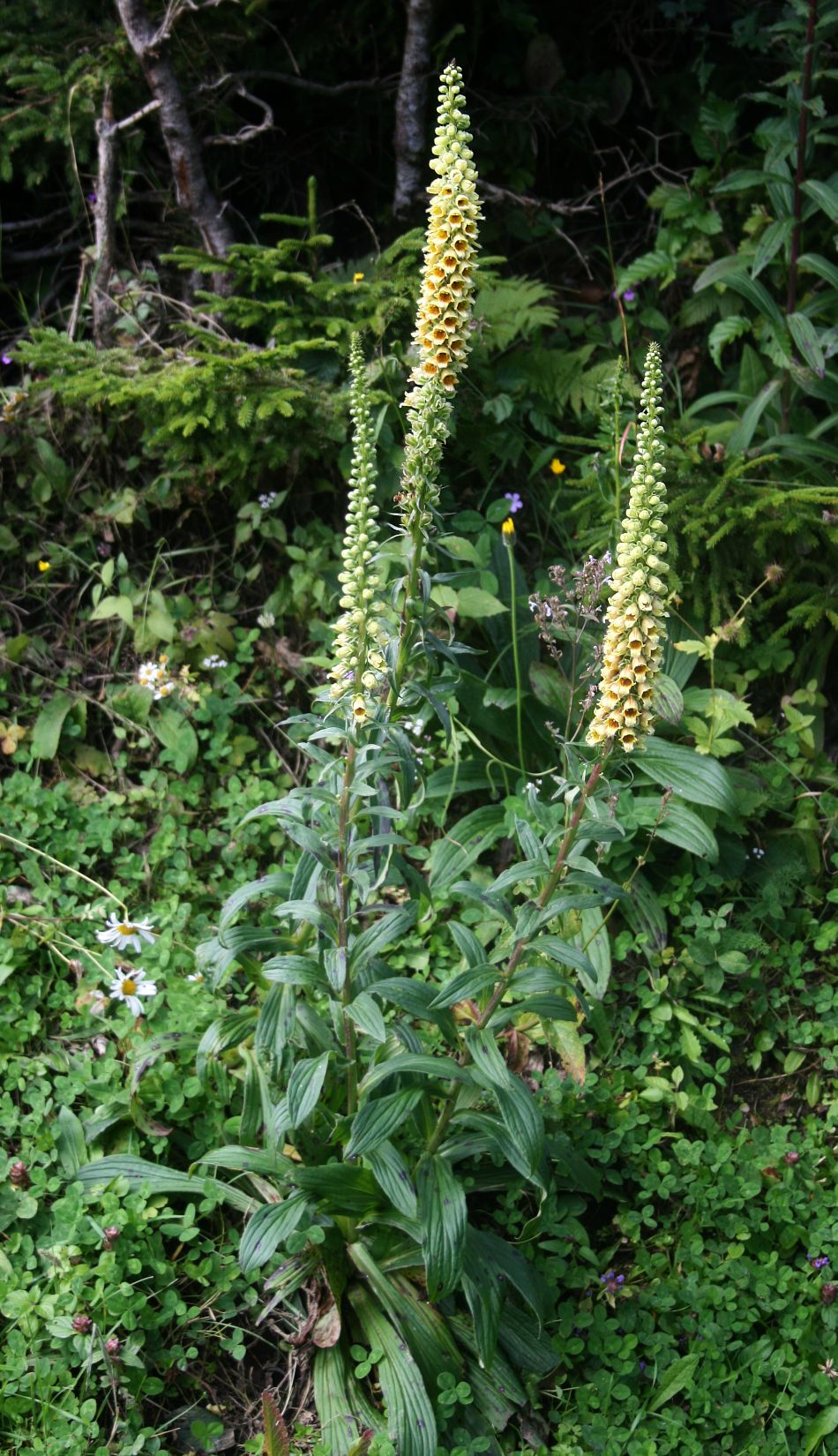 Digitalis ferruginea, Wegerichgewächse (Plantaginaceae) – Georgien/საქართველო: Kleiner Kaukasus, Didi Mitarbi E Bakuriani/ბაკურიანი, ca. 1550 m s.m.